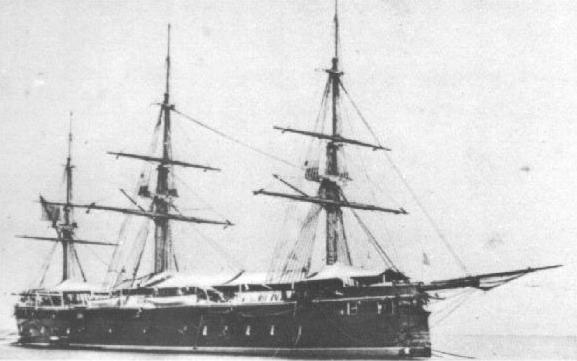 Fragata blindada Zaragoza, de la Armada Española; 1867 a 1892 (subastada en 1897)